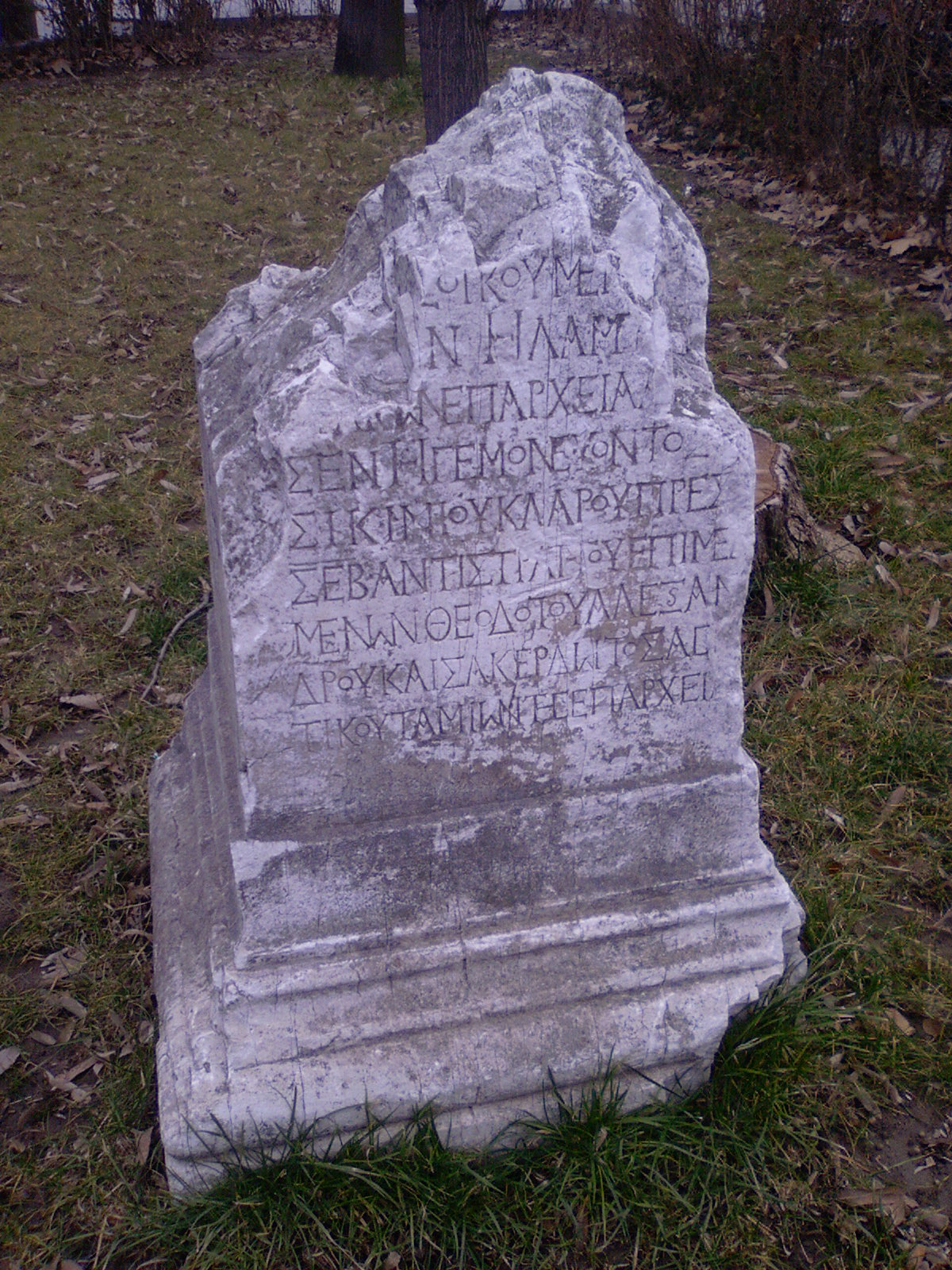 Надпис на Сикиний Клар от Филипопол